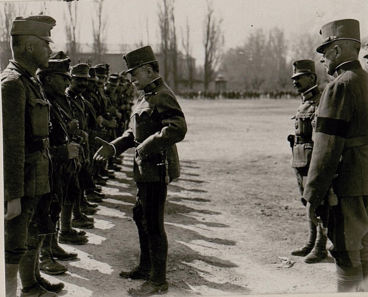 Inspizierung des 4.Tiroler Kaiserjägerregimentes durch Exzellenz Feldmarschall Conrad Freiherr von Hötzendorf am Piazza d'Armi in Trient